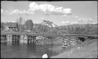 Le pont temporaire qui précéda le pont Thiffault. Il fut bâti en 1940 et fut remplacé par le pont actuel en 1946